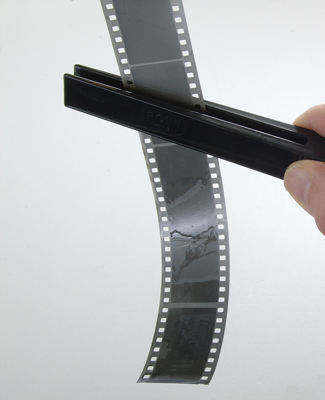 Handhabung einer Abstreifzange für die Filmentwicklung